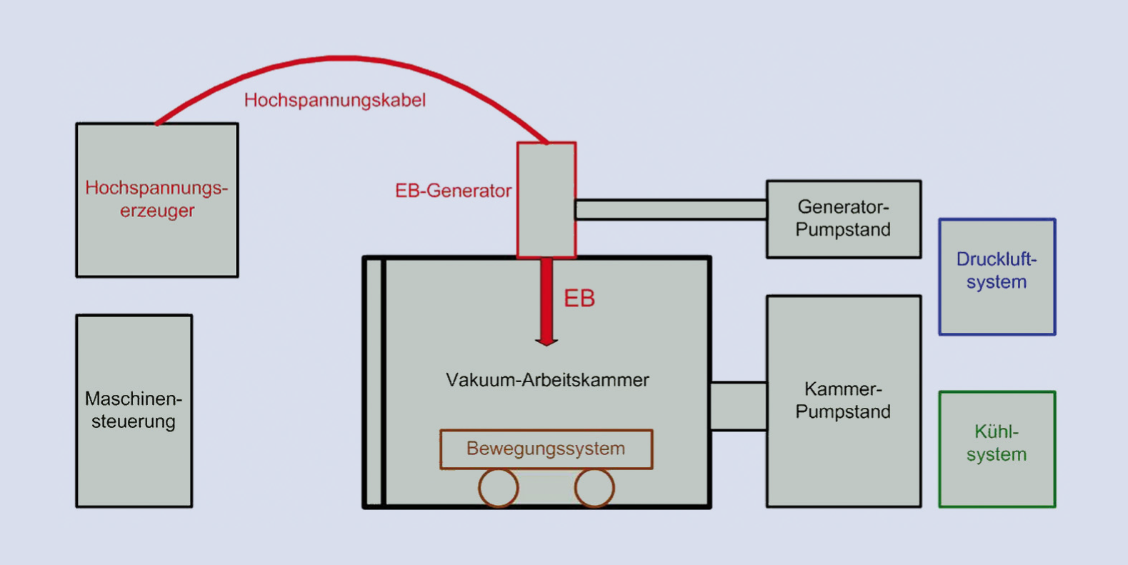 Prinzipschema